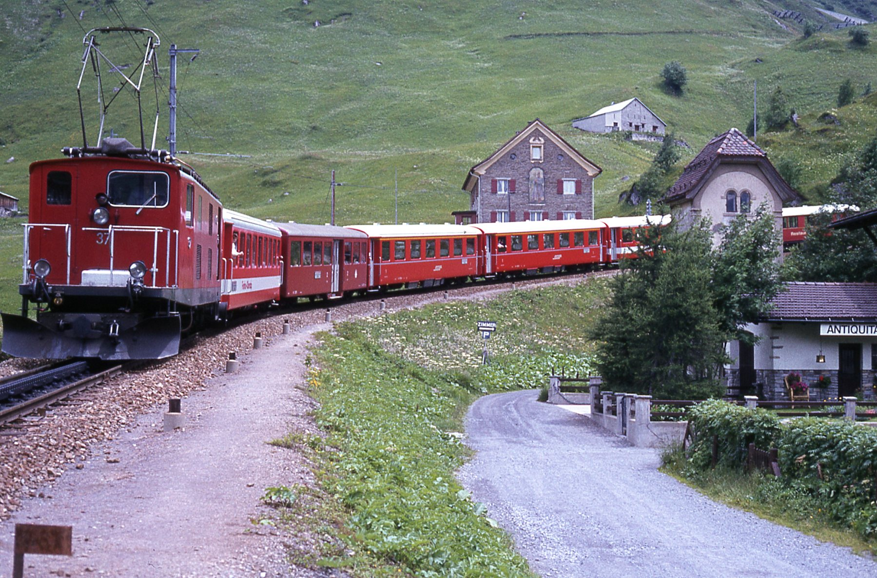 Photo prise dans les années 1980.